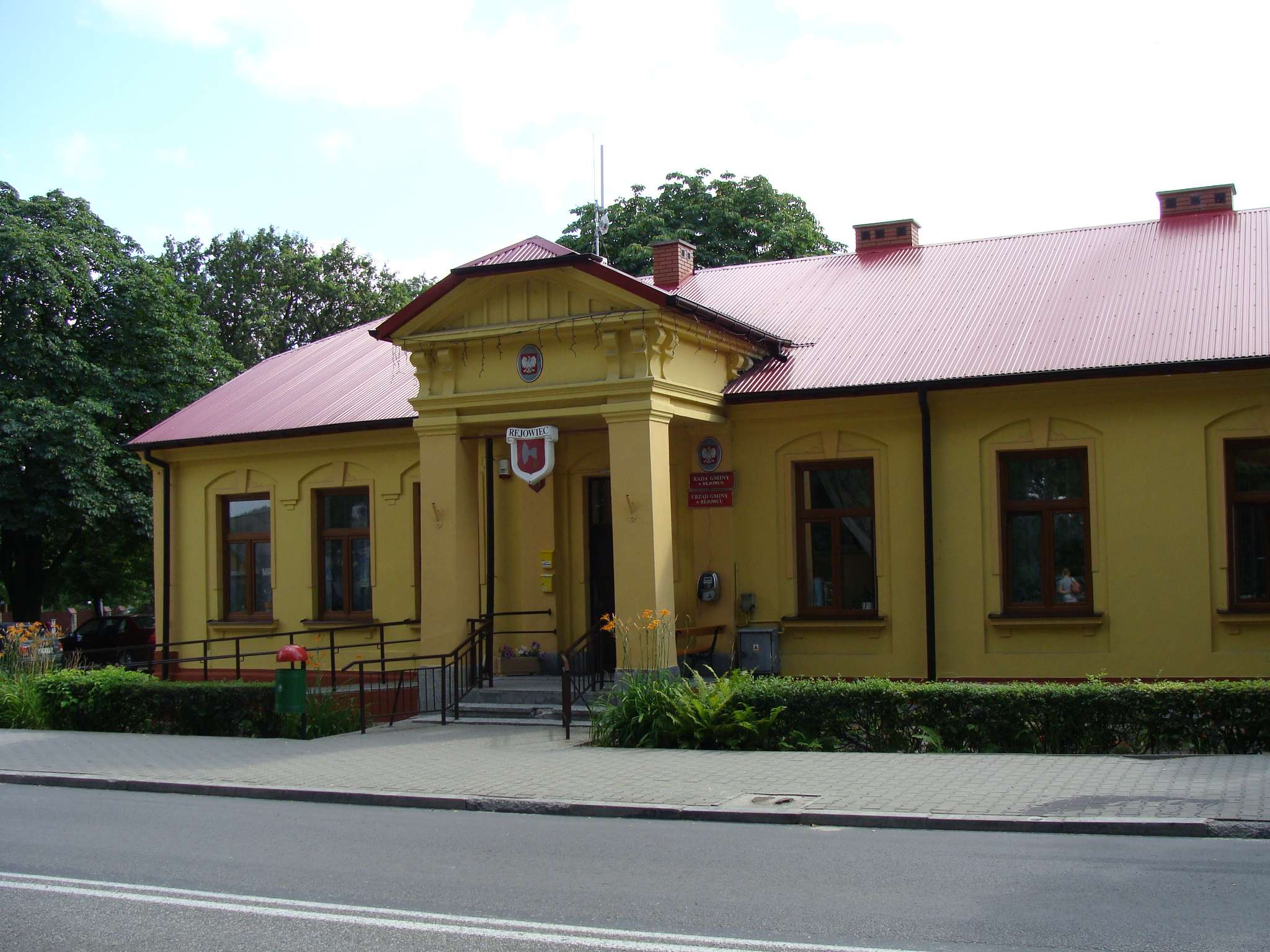 Urząd Gminy w Rejowcu